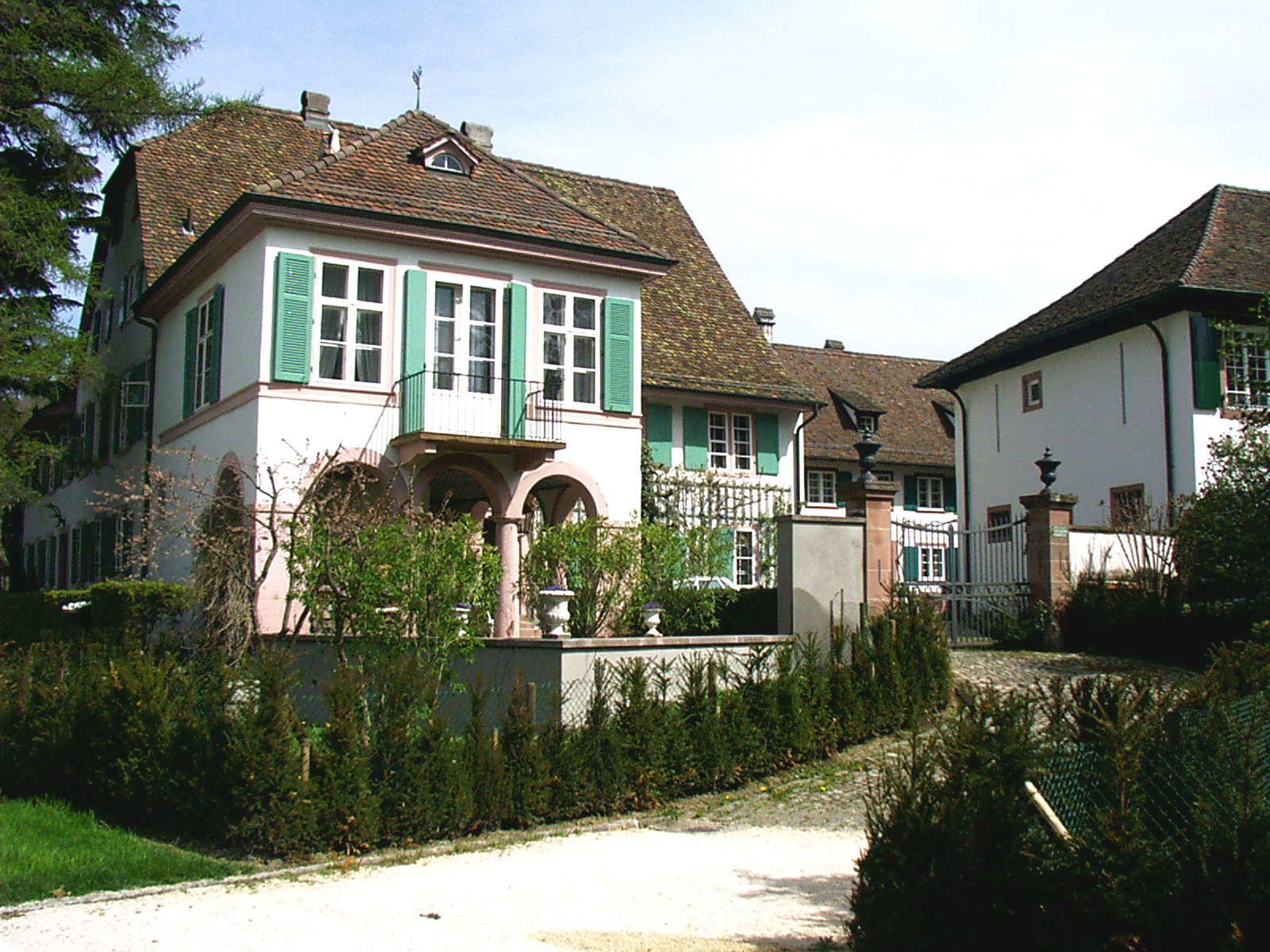 Riehen alter_Wenken